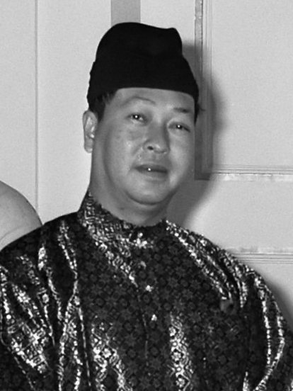 Koningin Juliana ontvangt sultan Salahuddin Abdul Aziz Shah van Selangor en zijn echtgenote op paleis Soestdijk 7 juli 1965